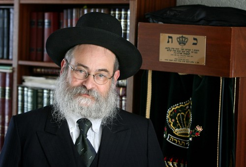 Binyomin Jacobs